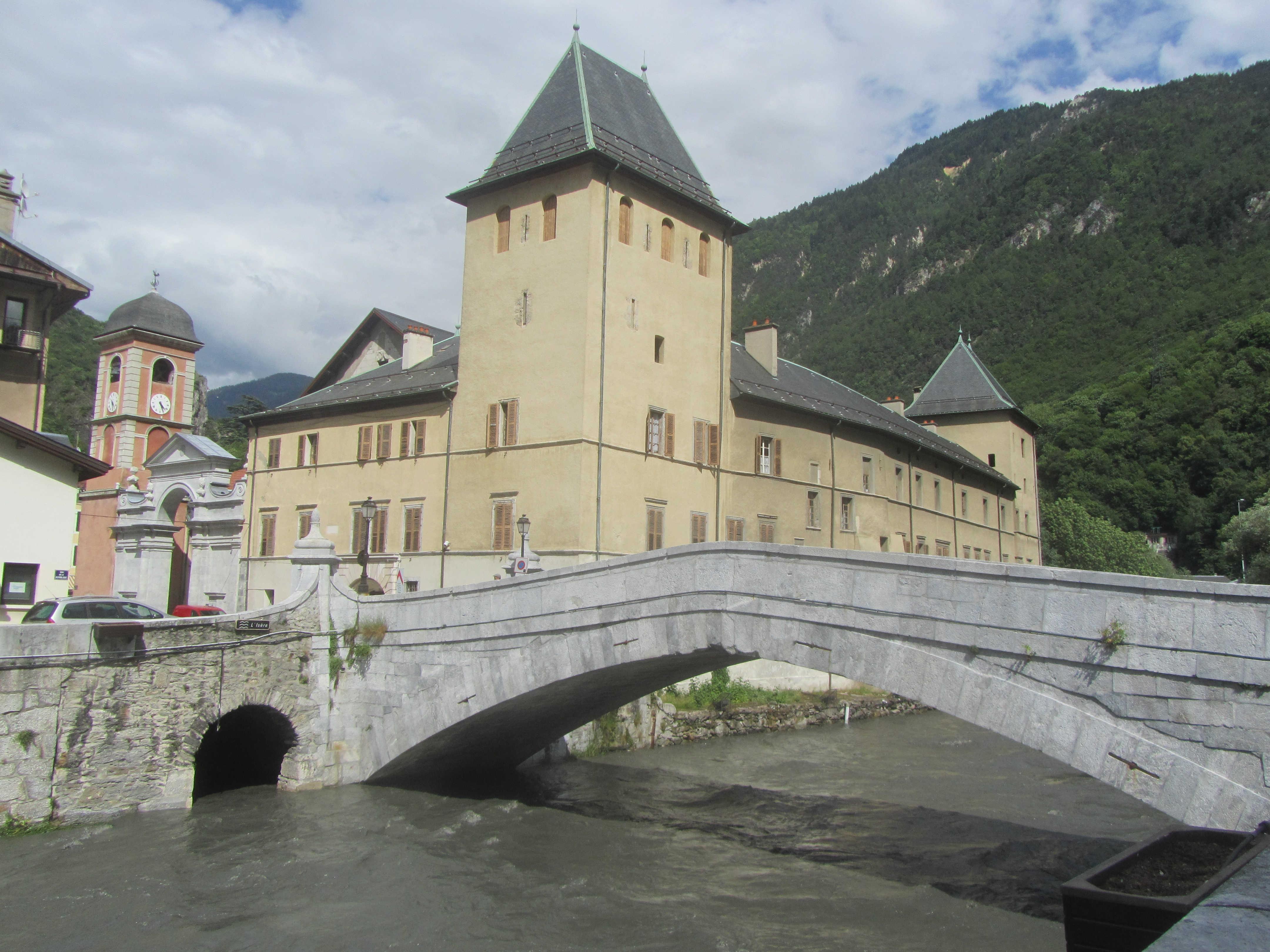 Le site de pont de la ville de Moûtiers